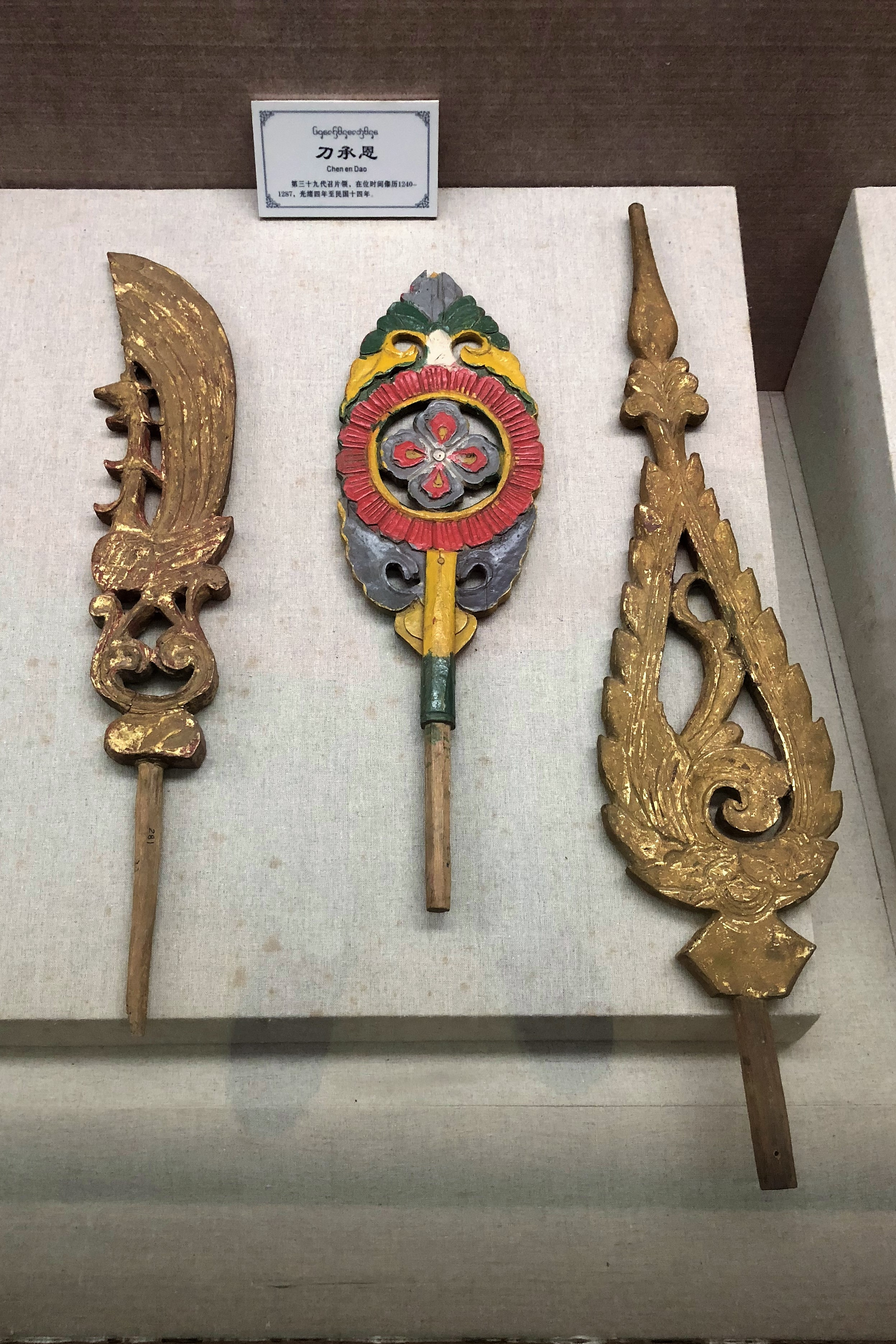 中文（中国大陆）: 傣族木雕。